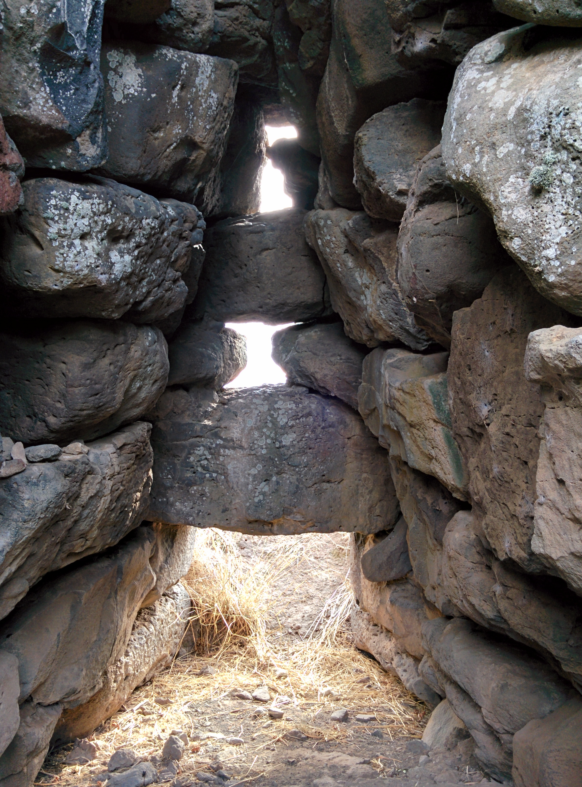 Architrave del nuraghe Arrubiu visto dall'interno